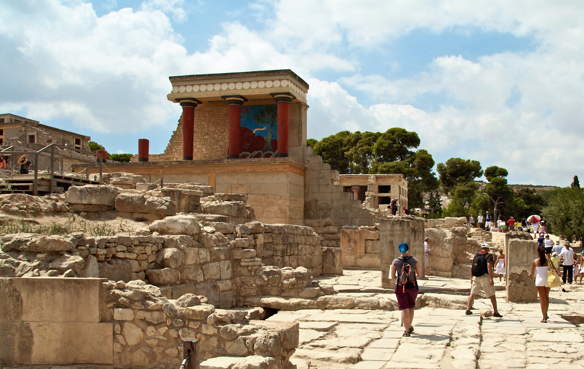 στο μινωϊκό ανάκτορο της Κνωσού